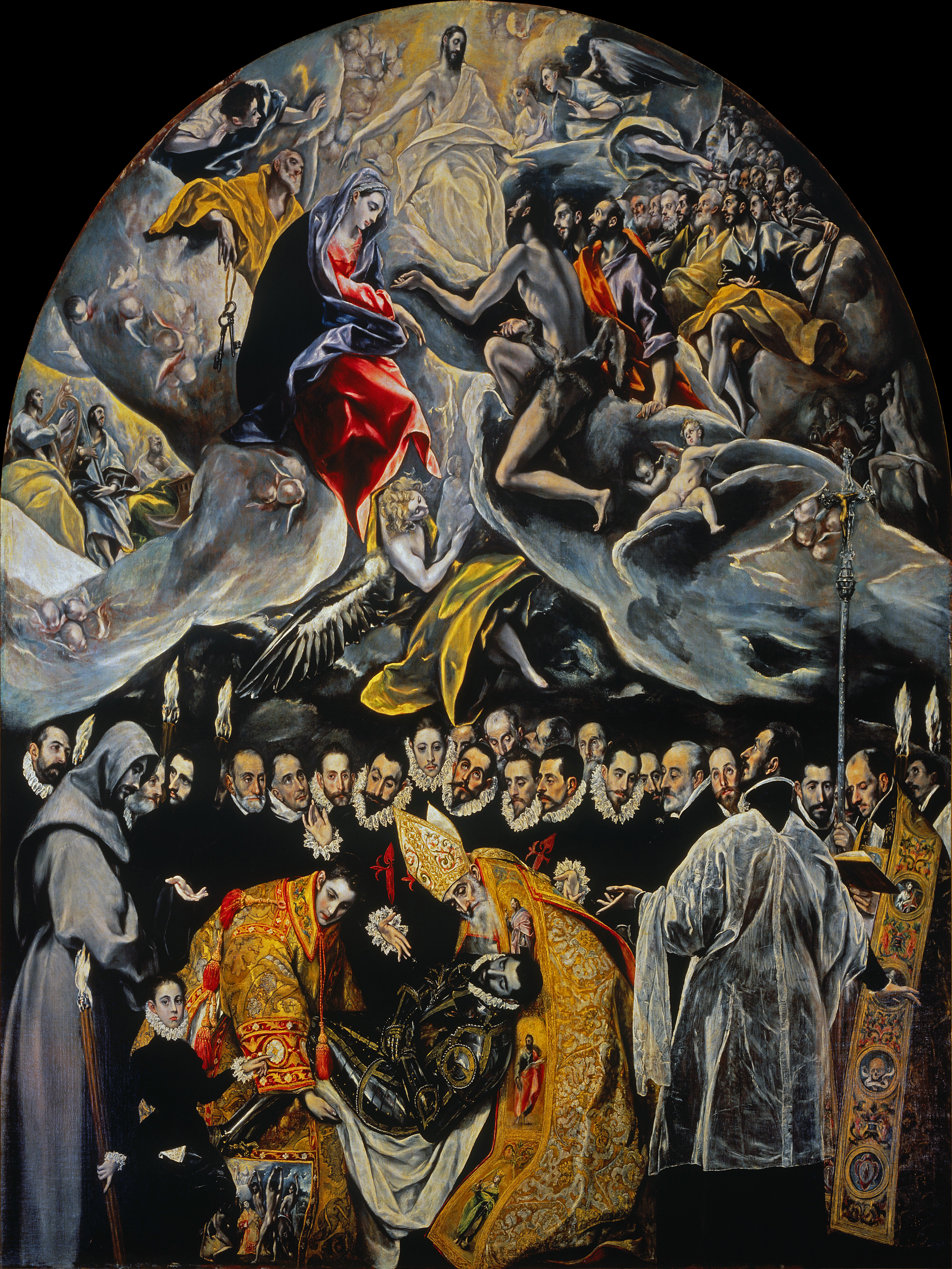 El entierro del señor de Orgaz, más conocido como El entierro del conde de Orgaz, es un óleo sobre lienzo pintado en estilo manierista por El Greco entre los años 1586 y 1588. Fue realizado para la iglesia de Santo Tomé de Toledo, (España), donde aun permanece, y es considerada una de las las mejores obras de su autor. El cuadro representa el milagro en el que, según la tradición, San Esteban y San Agustín de Hipona bajaron del Cielo para enterrar personalmente a Gonzalo Ruiz de Toledo, señor de la villa de Orgaz y fallecido en 1323, en la iglesia de Santo Tomé, como premio por su vida ejemplar de devoción, humildad y obras de caridad. El Greco aceptó el encargo de realizar la obra en 1586, algo más de dos siglos y medio después de los hechos que en ella representó.